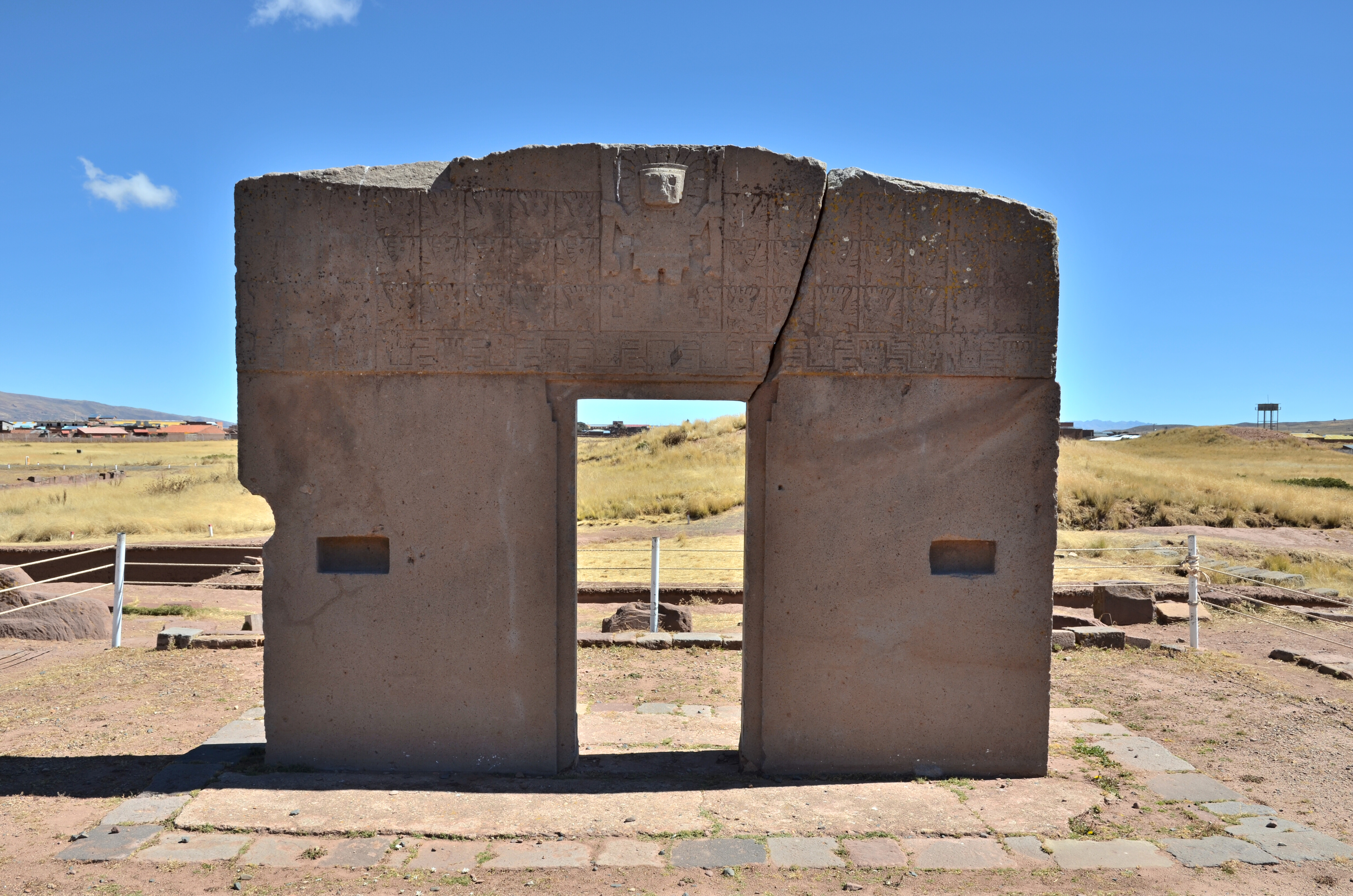 Sluneční brána - Puerta del Sol, Tiwanaku